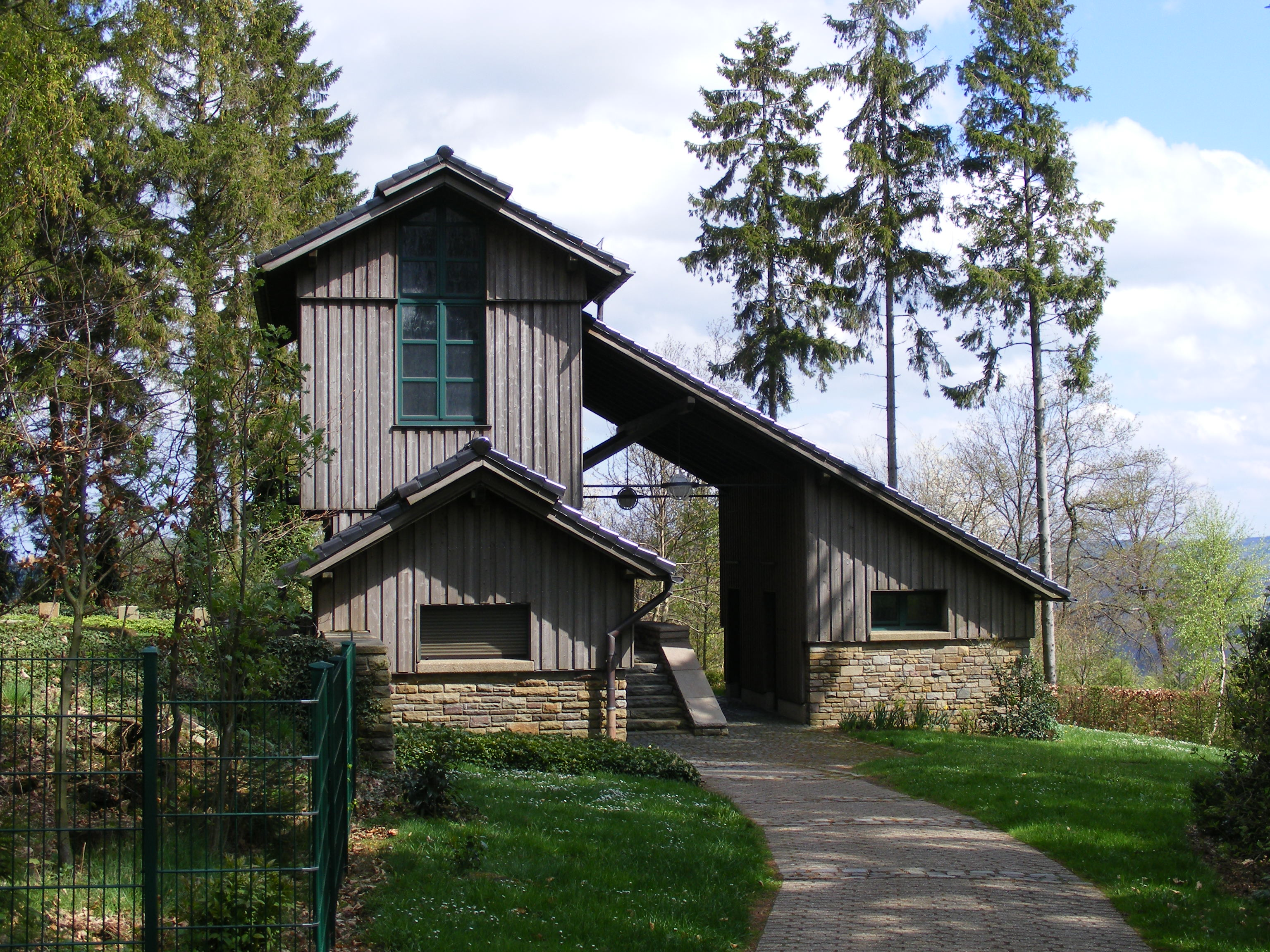 Eingangshalle Russenfriedhof in Simmerath, Eifel, Deutschland. Die Eingangshalle ist Prämiert mit dem Architekturpreis BDA Stadt Aachen 1993